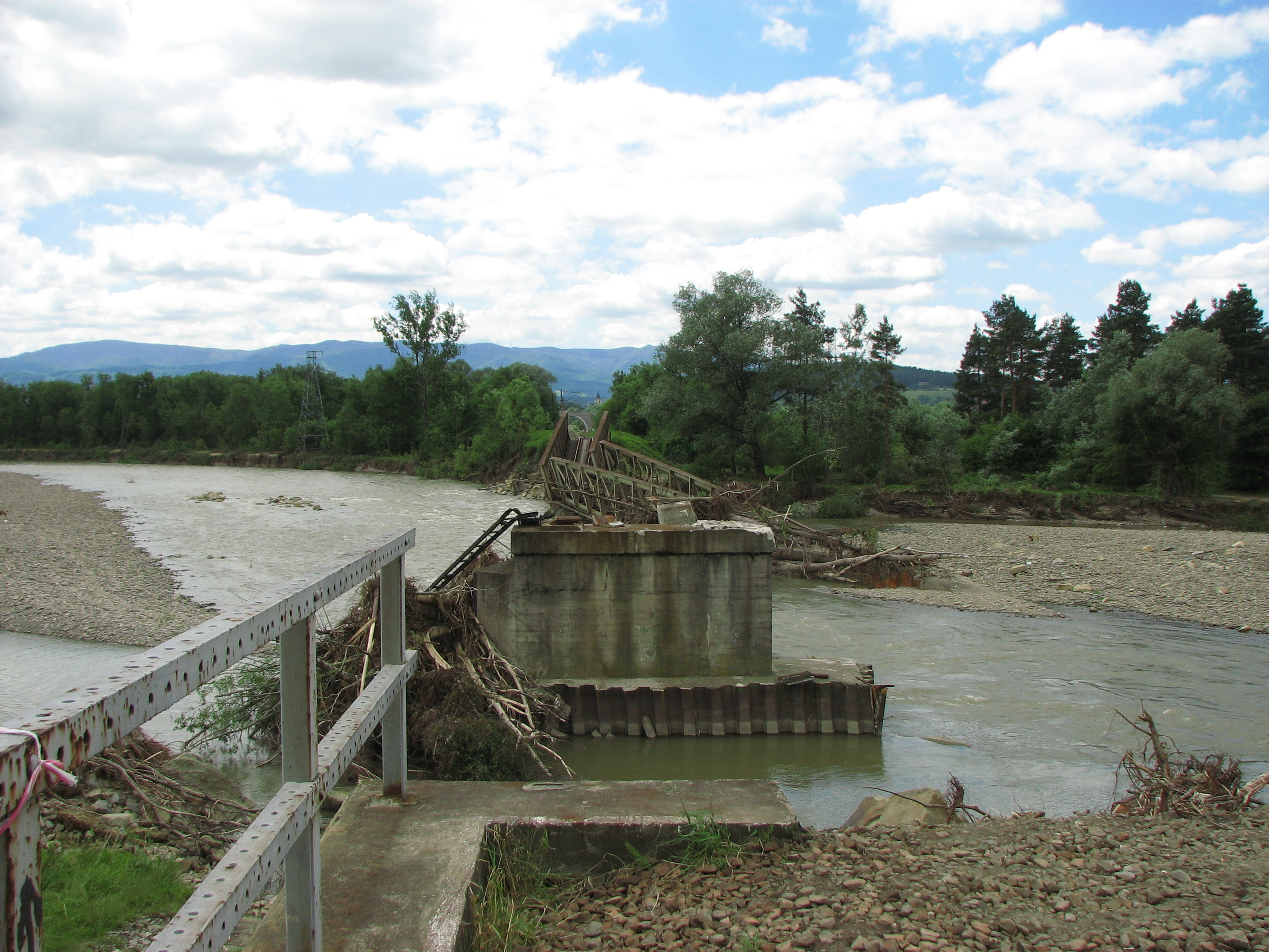 Zerwany 4 czerwca 2010 most kolejowy (linia kolejowa nr 96) nad rzeką Poprad między Nowym Sączem a Starym Sączem. Widok w stronę Starego Sącza.